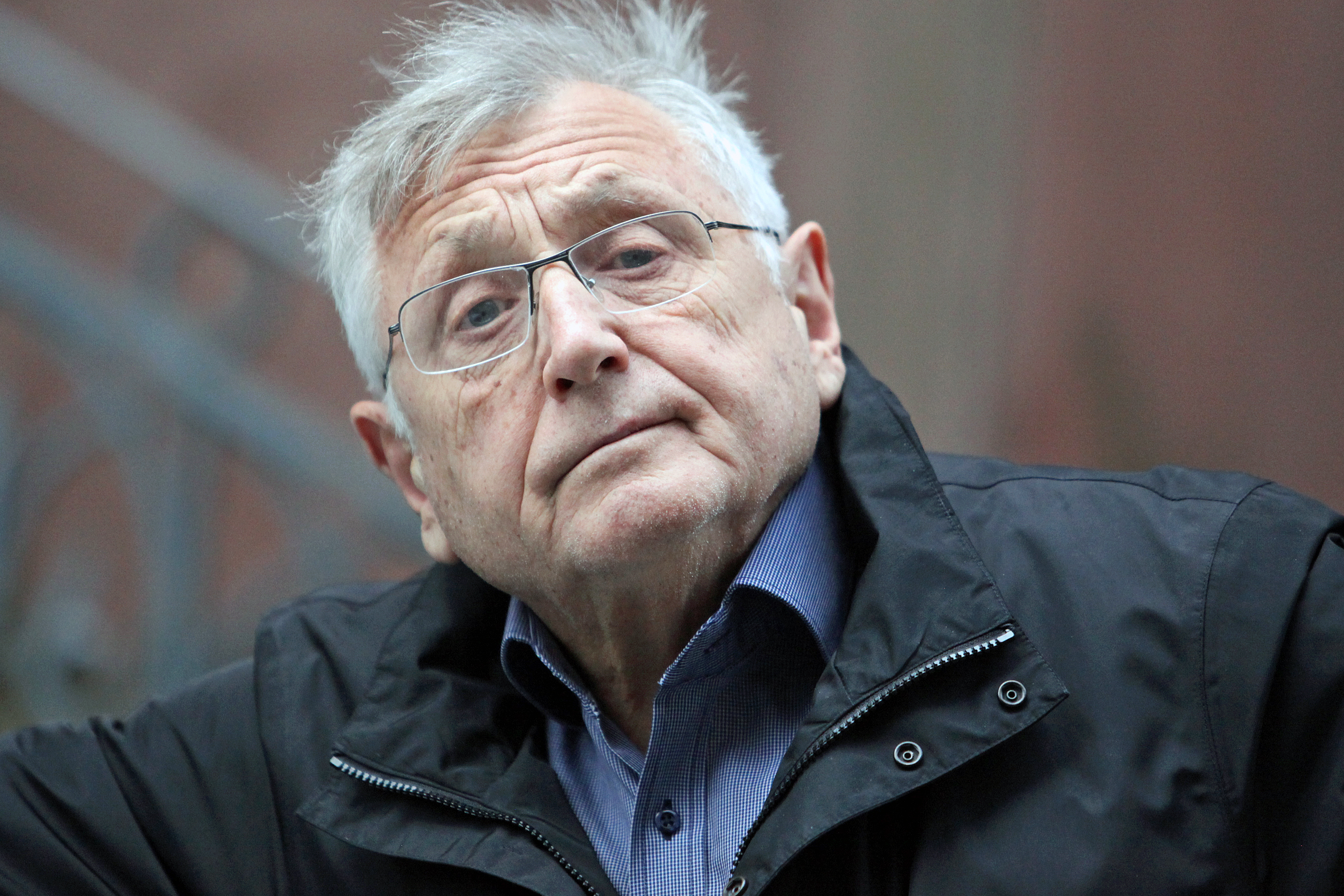 Der tschechische Filmregisseur und Schauspieler Jiří Menzel in Wiesbaden am 24. April 2016.